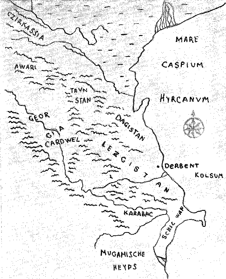 Карта Кавказа, составленная И.Г. Гербером в 1728 году при описании прикаспийских областей.